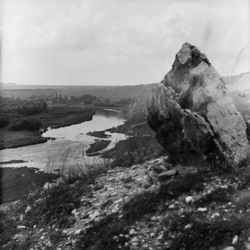 Floresti district.